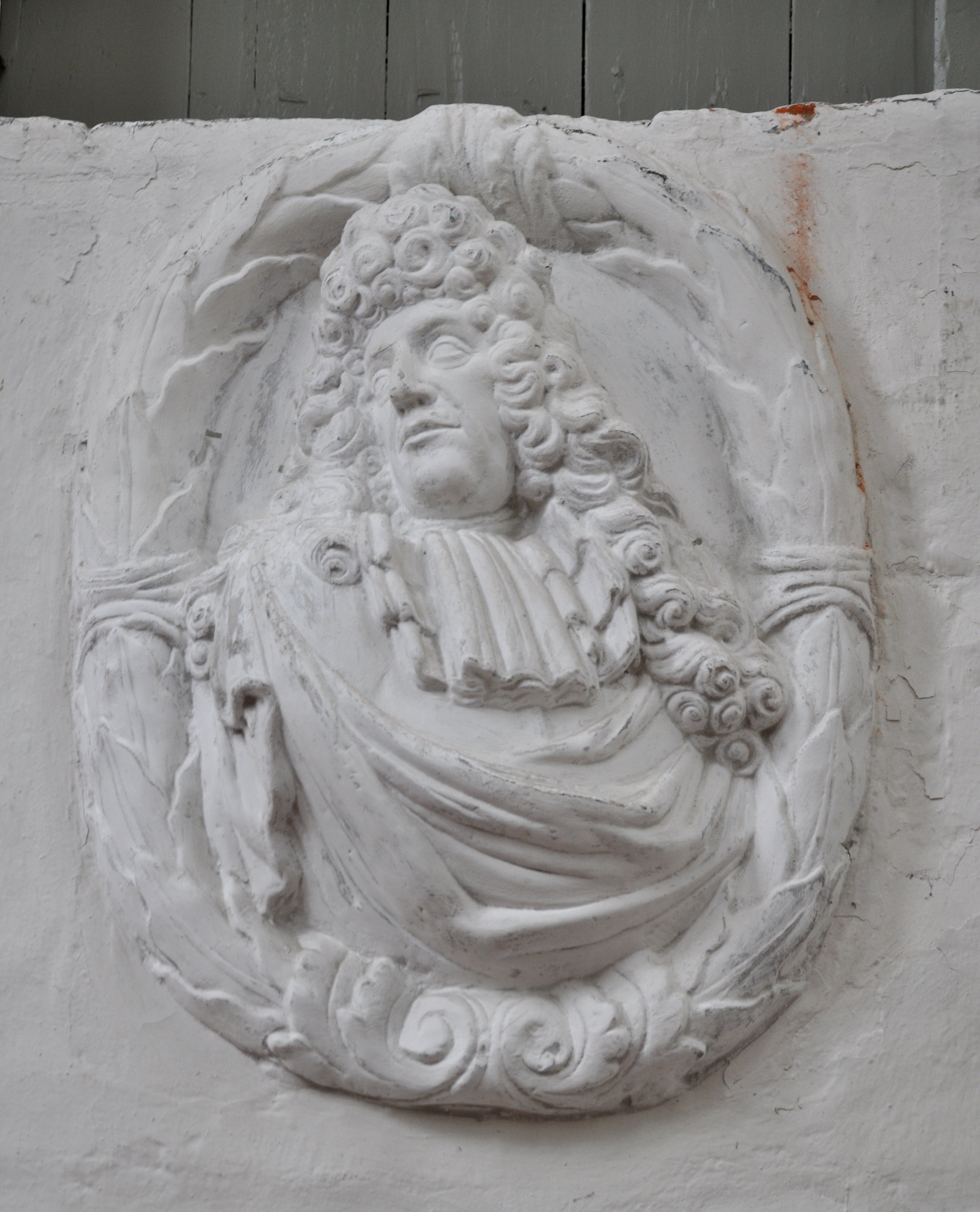 Bordesholm, Klosterkirche, Relief zur Erinnerung an den Kieler Mediziner Prof. Johann Daniel Major († 1693), Theodor Allers zugeschrieben